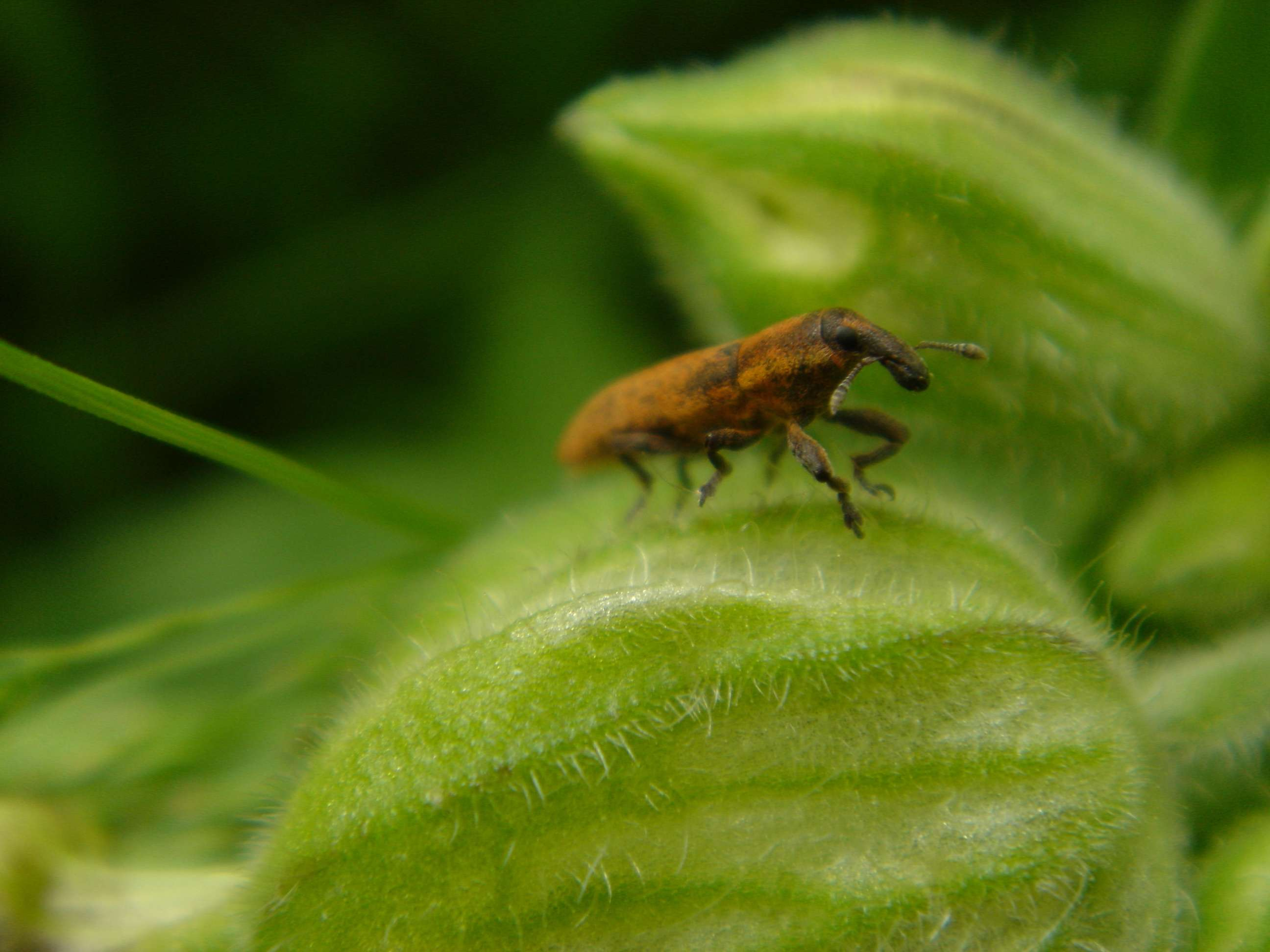 Ormányos bogár virágbimbón